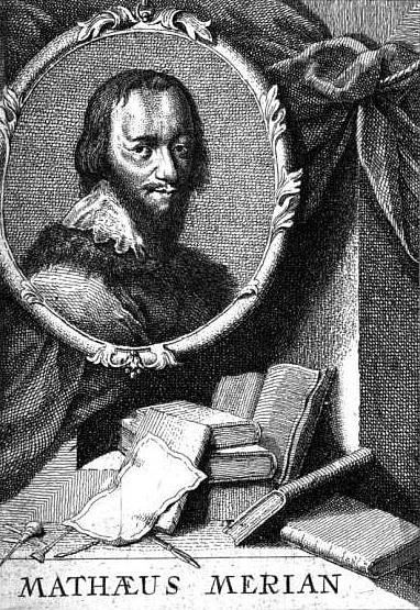 Portrait des Kupferstechers Matthäus Merian d. Ä.